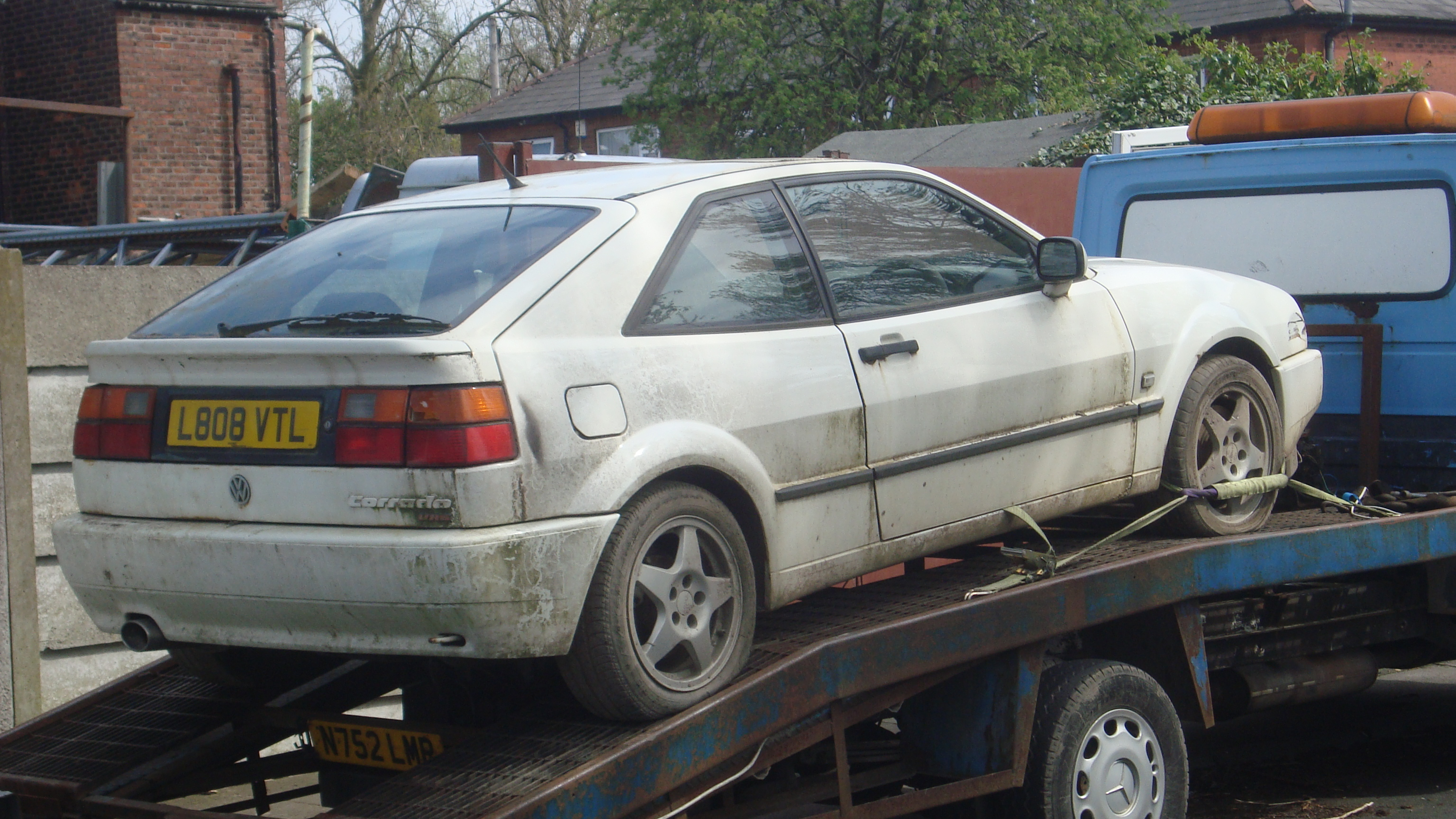 1993 Volkswagen Corrado VR6